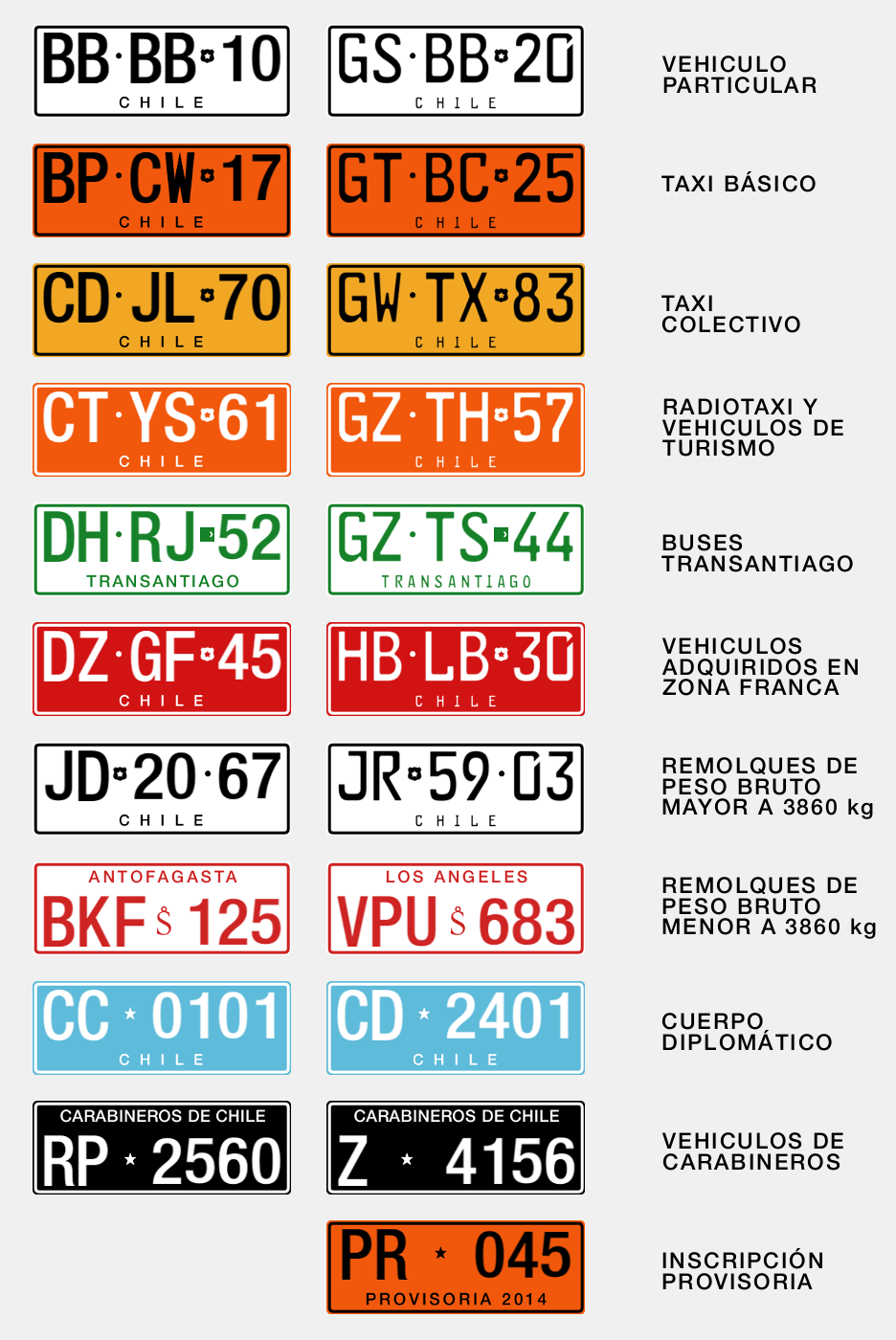 Distintos tipos de patentes vehiculares usadas actualmente en Chile